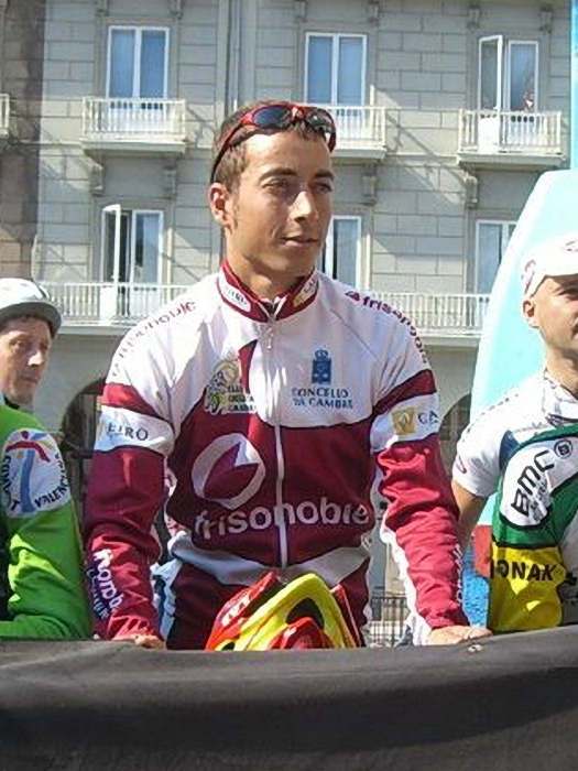 Gonzalo Rabuñal, ciclista de Galiza